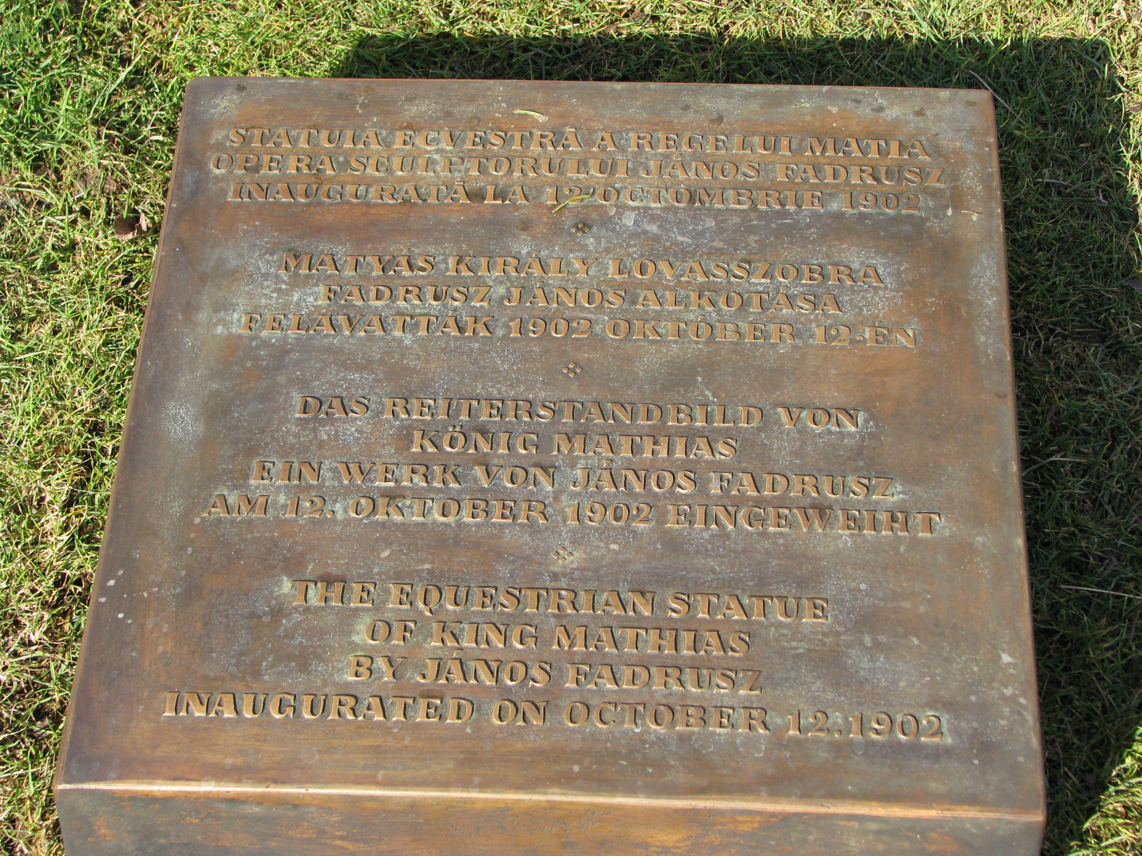 Négynyelvű tábla a kolozsvári Mátyás-szobor előtt